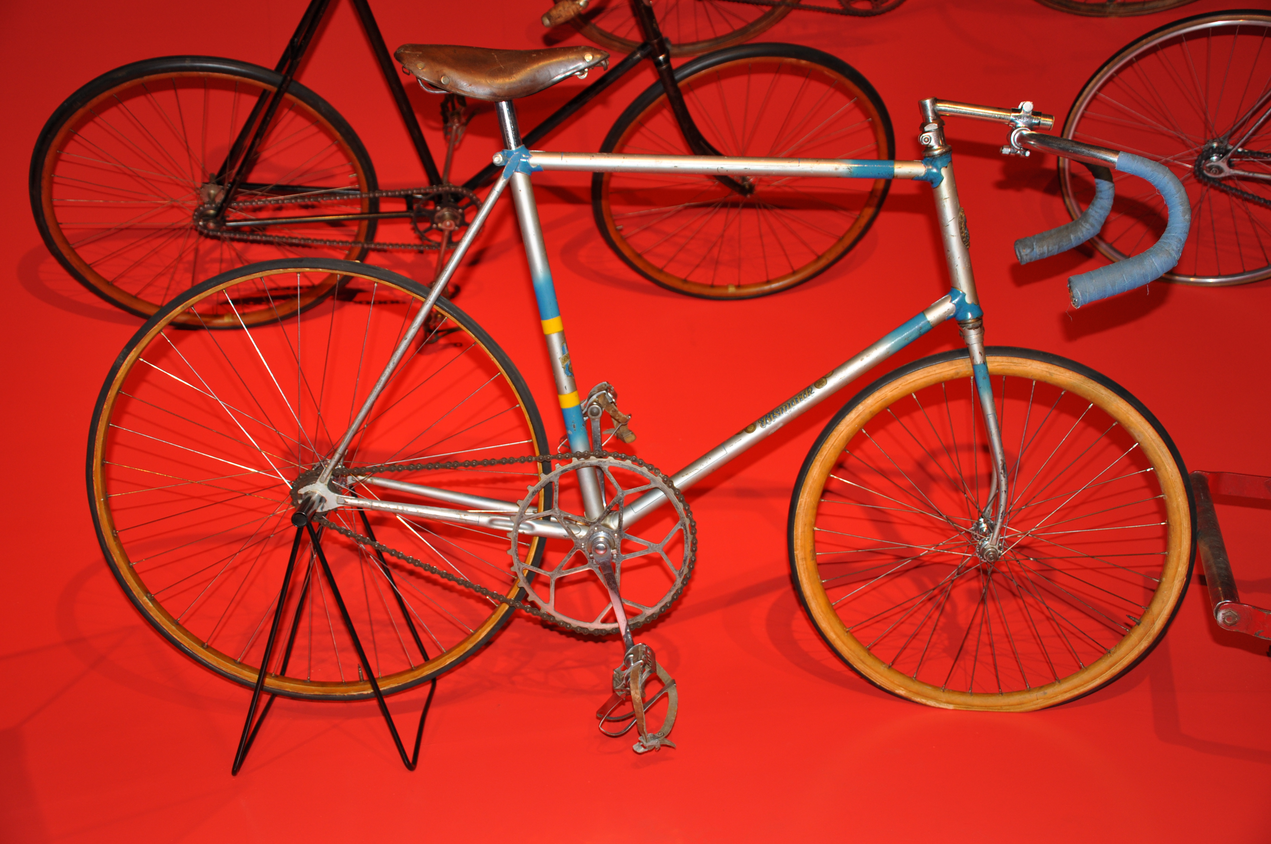 Steher-Bahnrennrad, Bismarck Werke, Radevormwald, 1949 bis 1952, 9,7 kg - Leihgabe Deutsches Fahrradmuseum, Bad Brückenau The making of this document was supported by the Community-Budget of Wikimedia Germany.